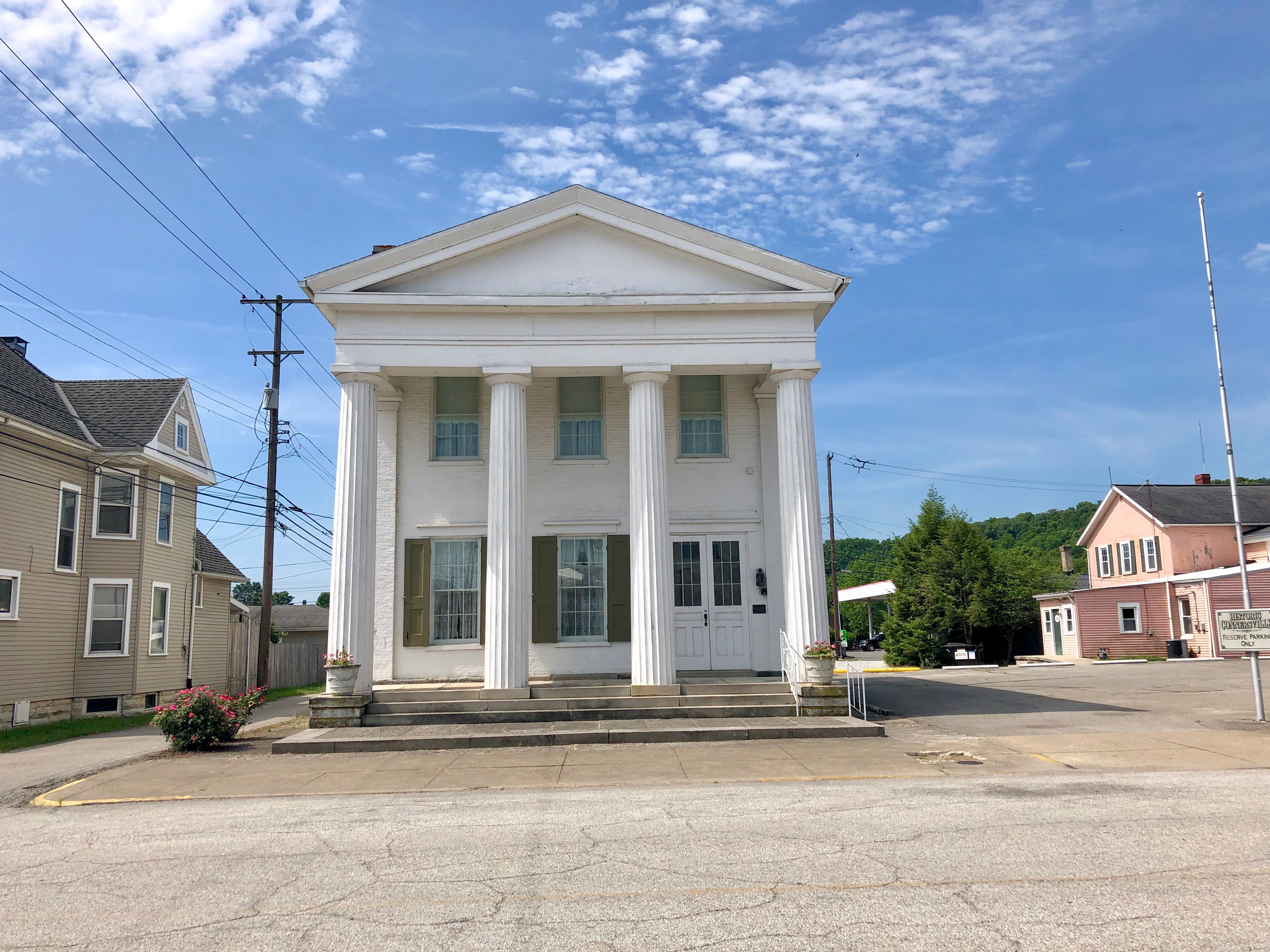 Canal House, Connersville, IN